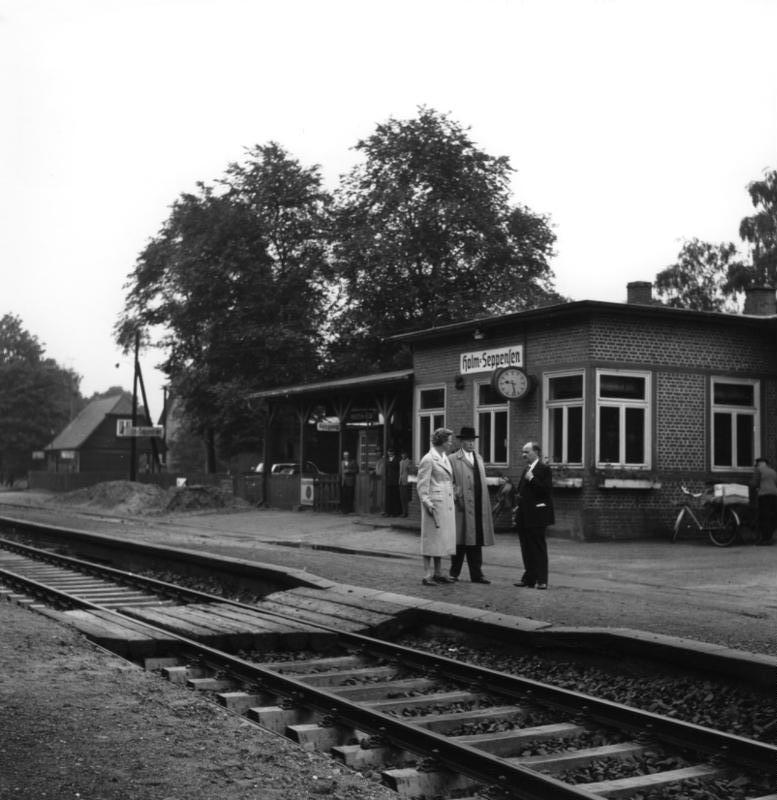 Bundeskanzler Dr. Konrad Adenauer mit seiner Sekretärin und Regierungssprecher Felix von Eckardt bei einer Wahlreise im September 1957